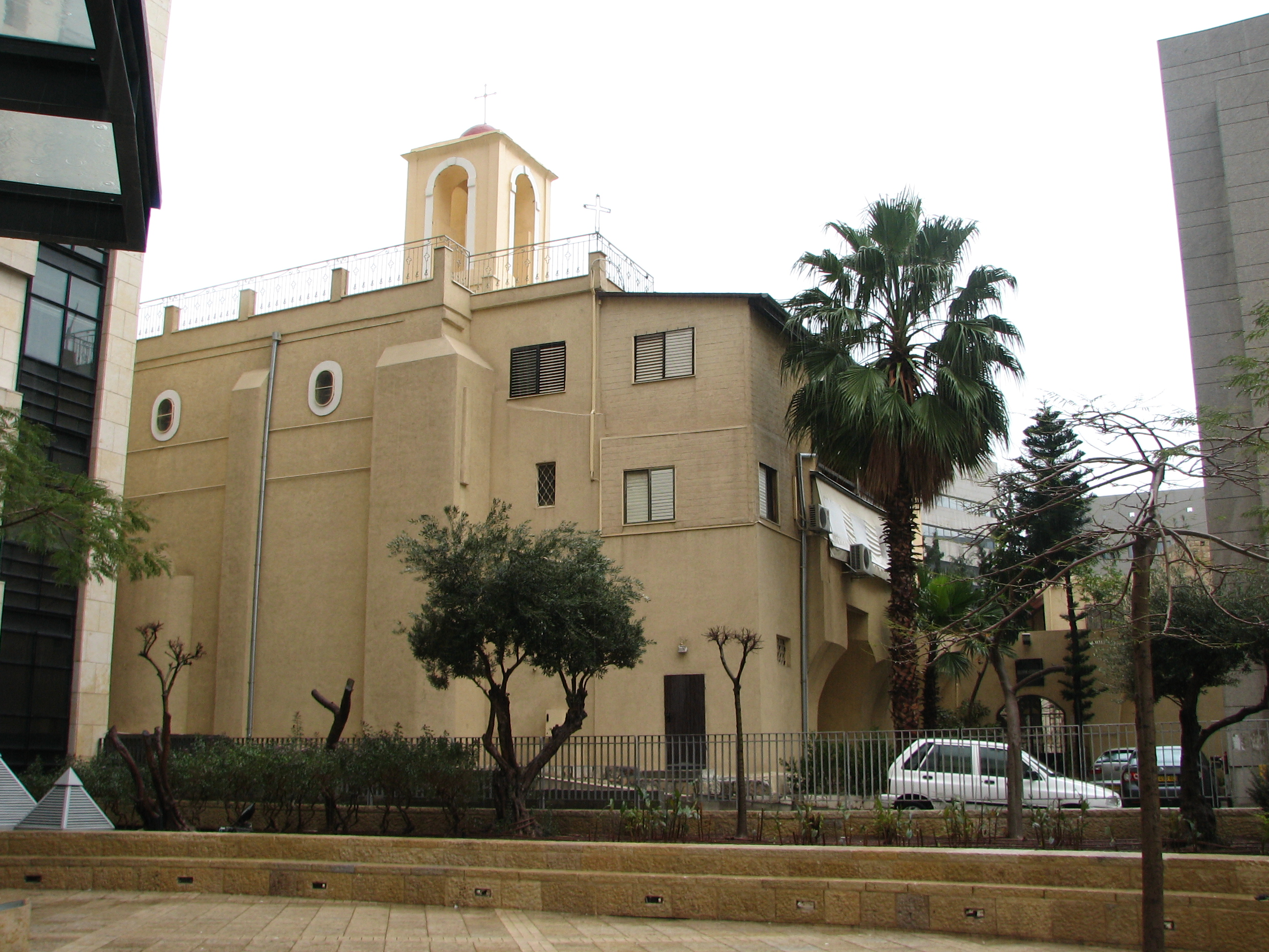 House of Grace, Haifa, Israel כנסיית אל-סיידה שבית החסד נמצא בתחומה הכנסייה היוונית-קתולית הקימה בשנת 1862 כנסייה בשם "סנטה מריה". היום משמש הבית מוסד שיקומי לאסירים משוחררים ובית מחסה לנשים נזקקות שוכן ברחוב פל-ים בעיר התחתית בחיפה